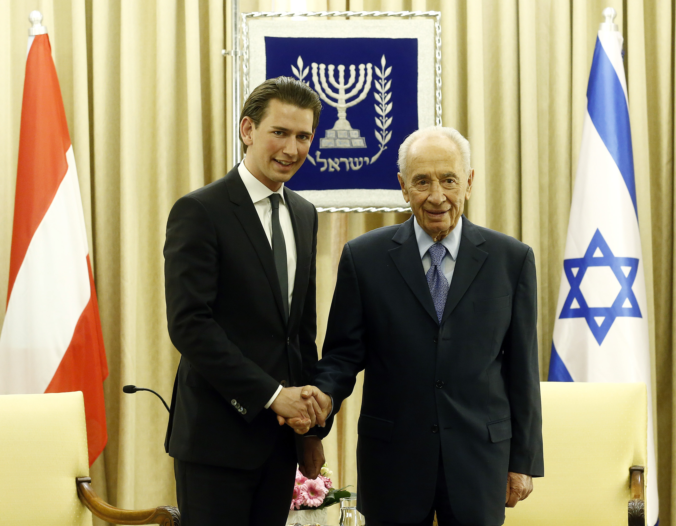 Arbeitsbesuch Israel. Außenminister Sebastian Kurz trifft den israelischen Präsidenten Shimon Peres. Jerusalem. 22.04.2014, Foto: Dragan Tatic